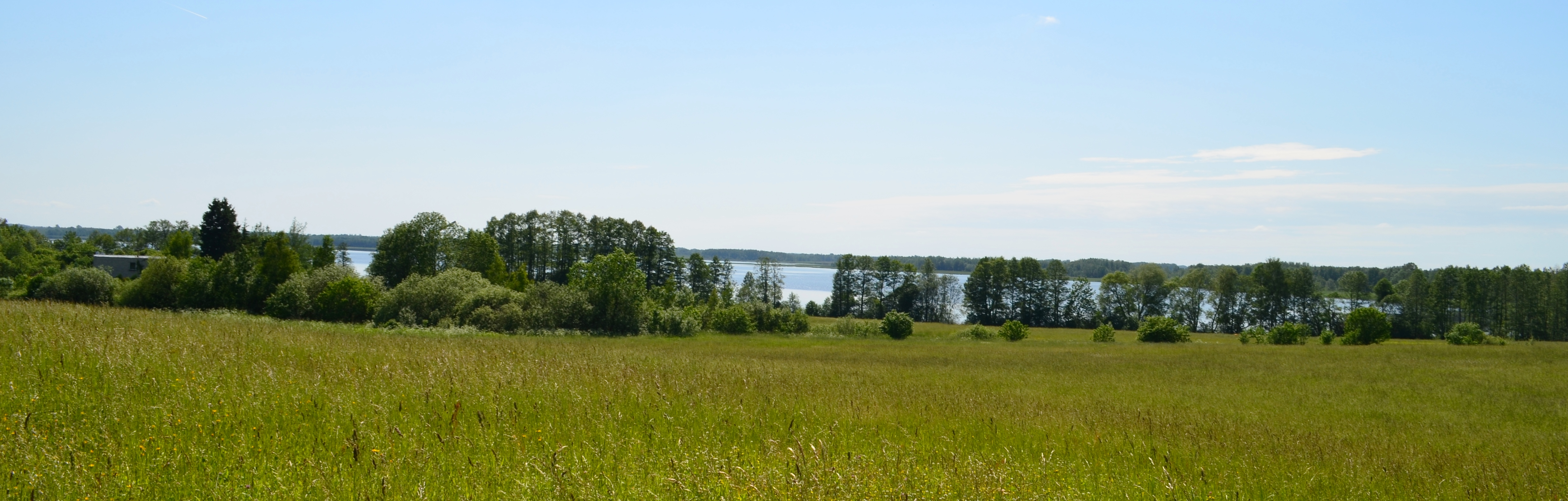 Apvardų ežeras nuo Čepukų, Ignalinos r.